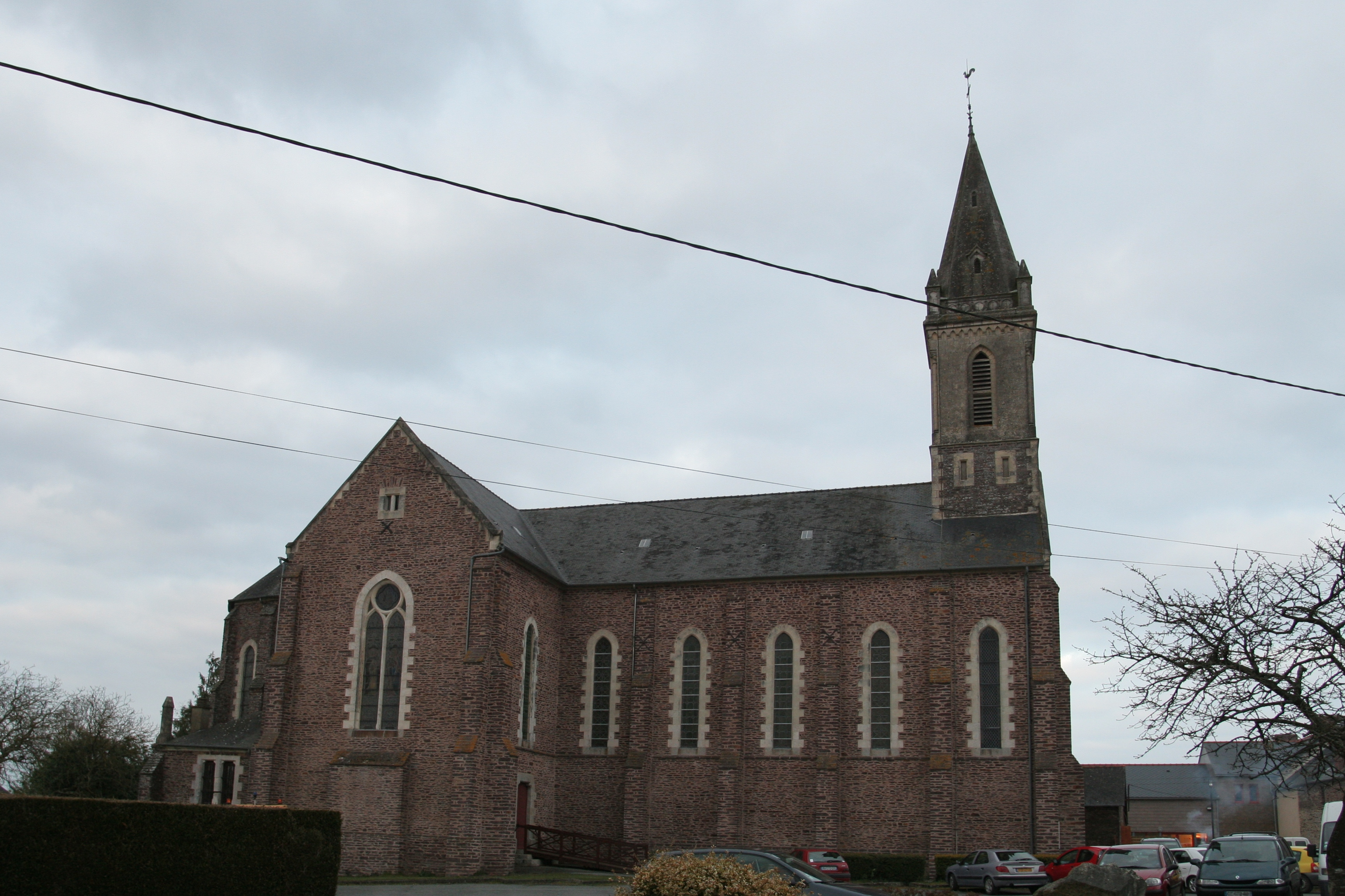 L'église Saint-Malo de Treffendel.